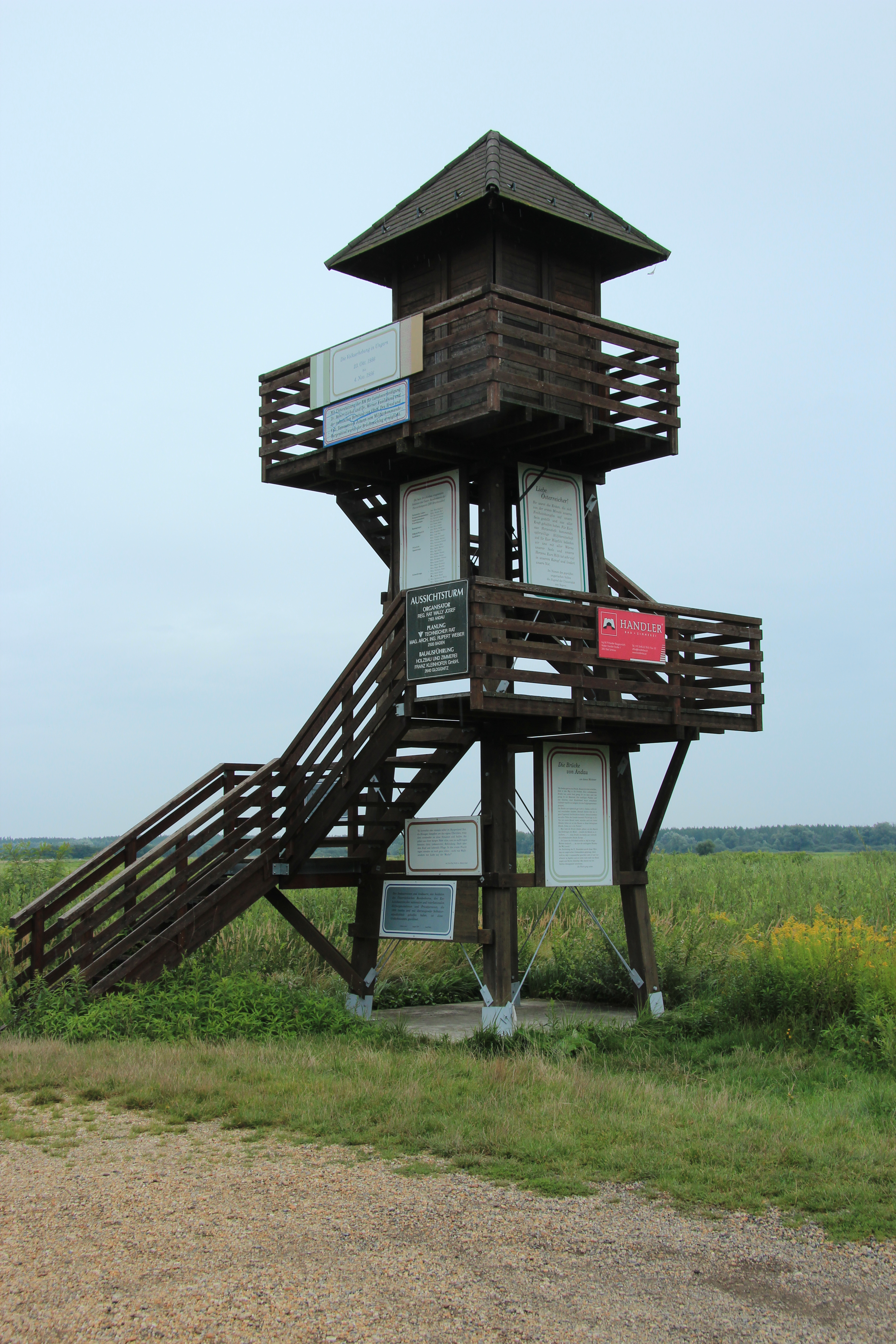 Aussichtsturm und Gedenkstätte an die Brücke von Andau